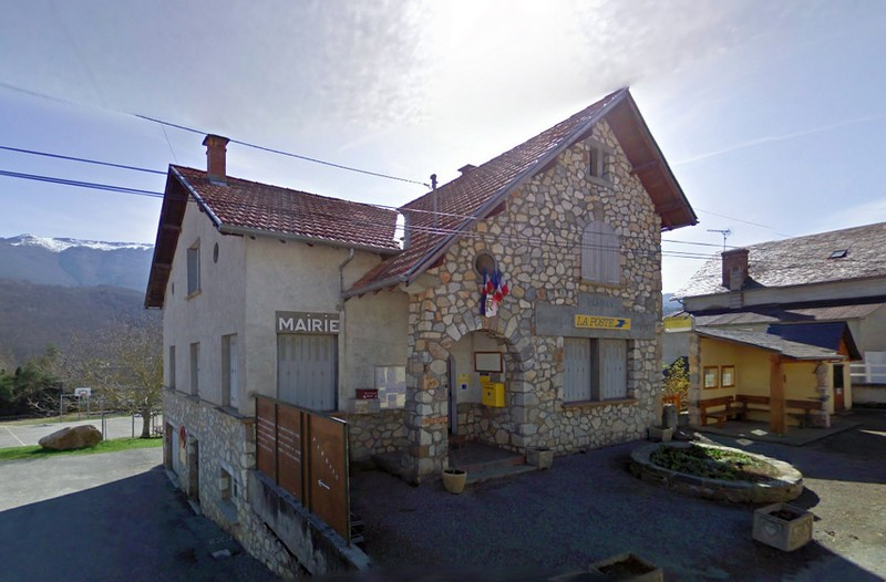 La mairie et la poste d'Orgibet